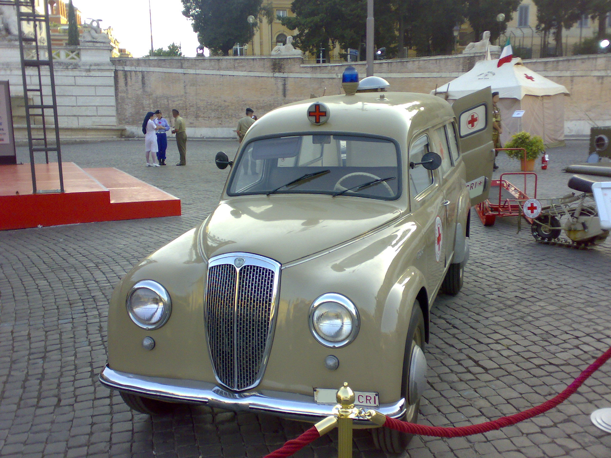 Lancia Appia C86S Autolettiga, guida a sinistra, prodotta dall'aprile 1954 al dicembre 1955 in 18 esemplari. Autoambulanza, usata dalla Croce Rossa Italiana.